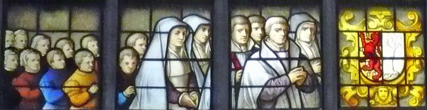 Glas 9 in Janskerk Gouda, De aankondiging van de geboorte van Johannes de Doper, 1561.